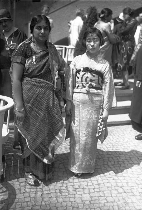 Inder unter Frauenführung! Saradschini Naidu, die Führerin der Anhänger Ghandis, welche nach der Verhaftung Ghandis die Führung der Unabhängigkeitsbewegung leitet.